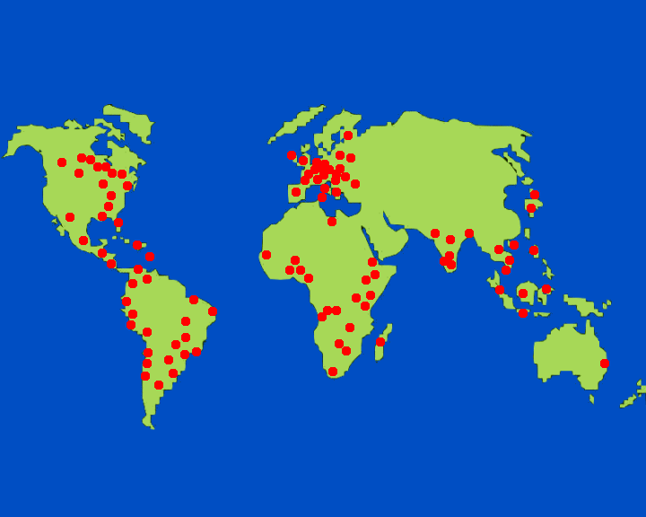 Verbreitungskarte der Ursulinen